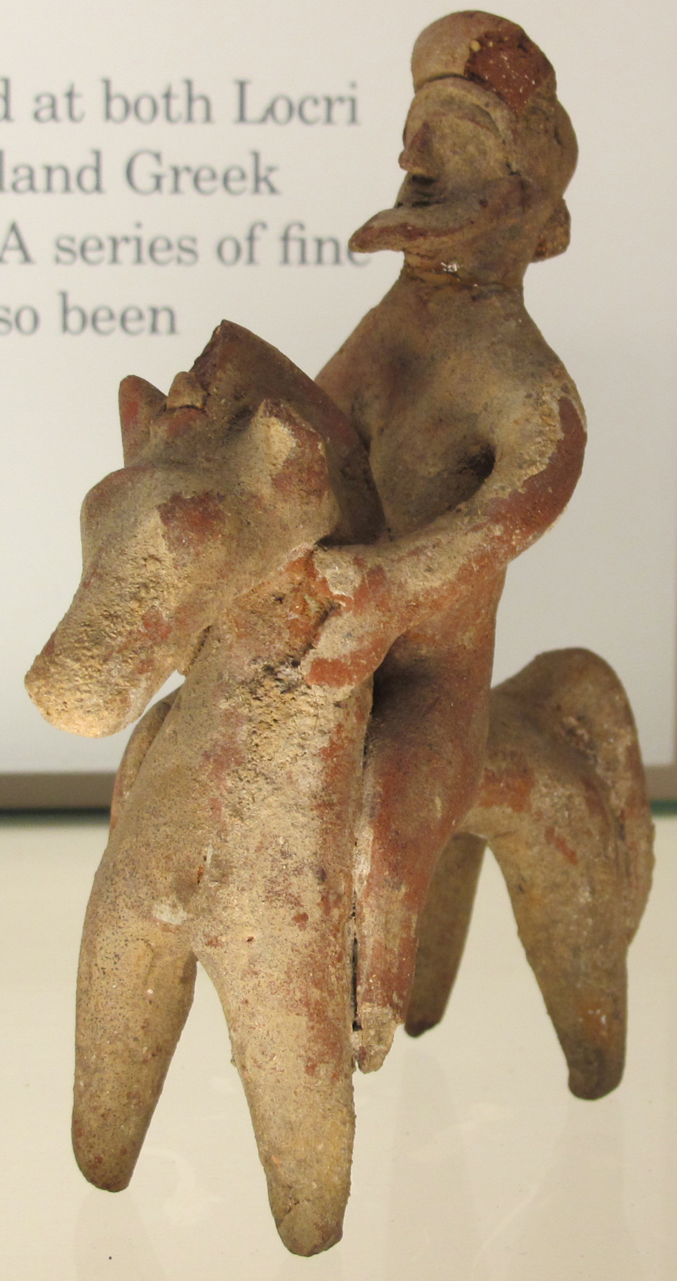 Medma, figurina di cavaliere barbuto, 490 ac. ca.